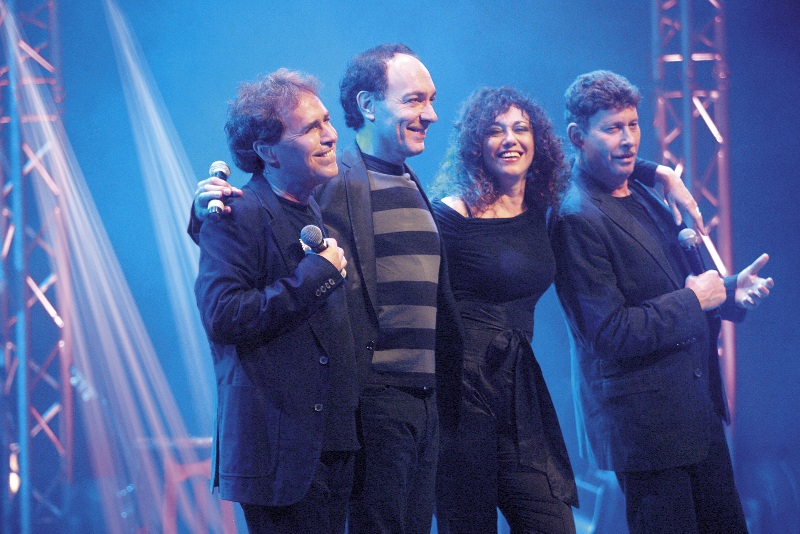 להקת הכל עובר חביבי